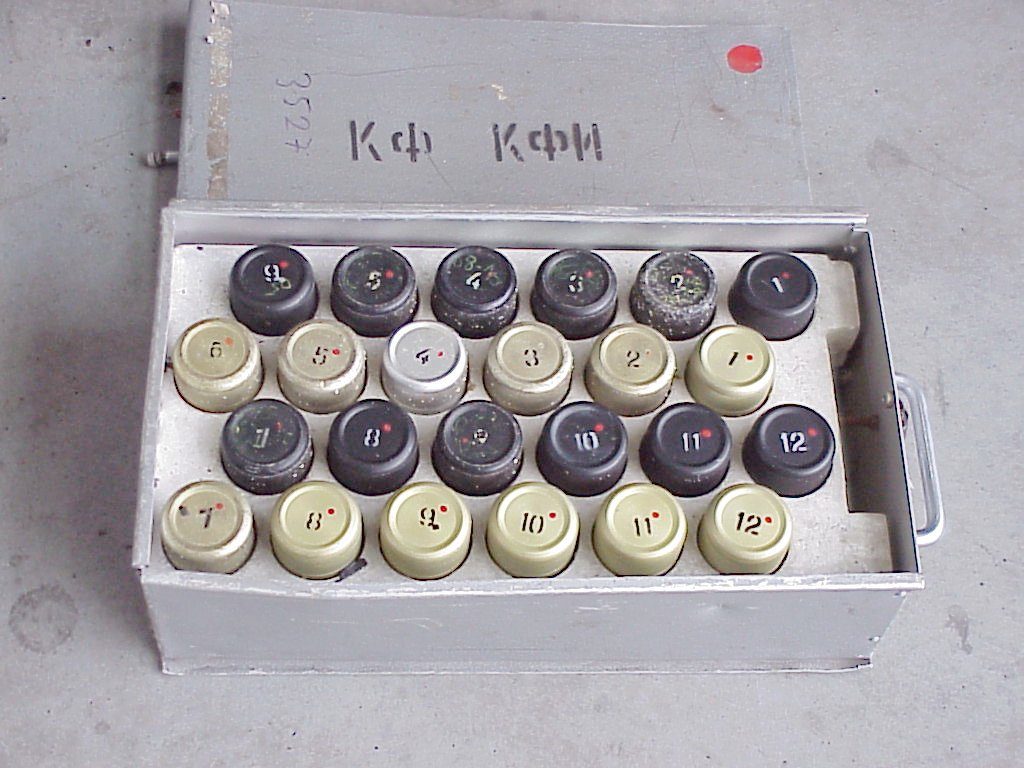 Filterkiste mit den 12 Filterpaaren für das Kremnij-2 System, die Filter КФ waren die Einsatzfilter, die hier schwarzen Filter КФИ die Imitationsfilter zur Abstimmung